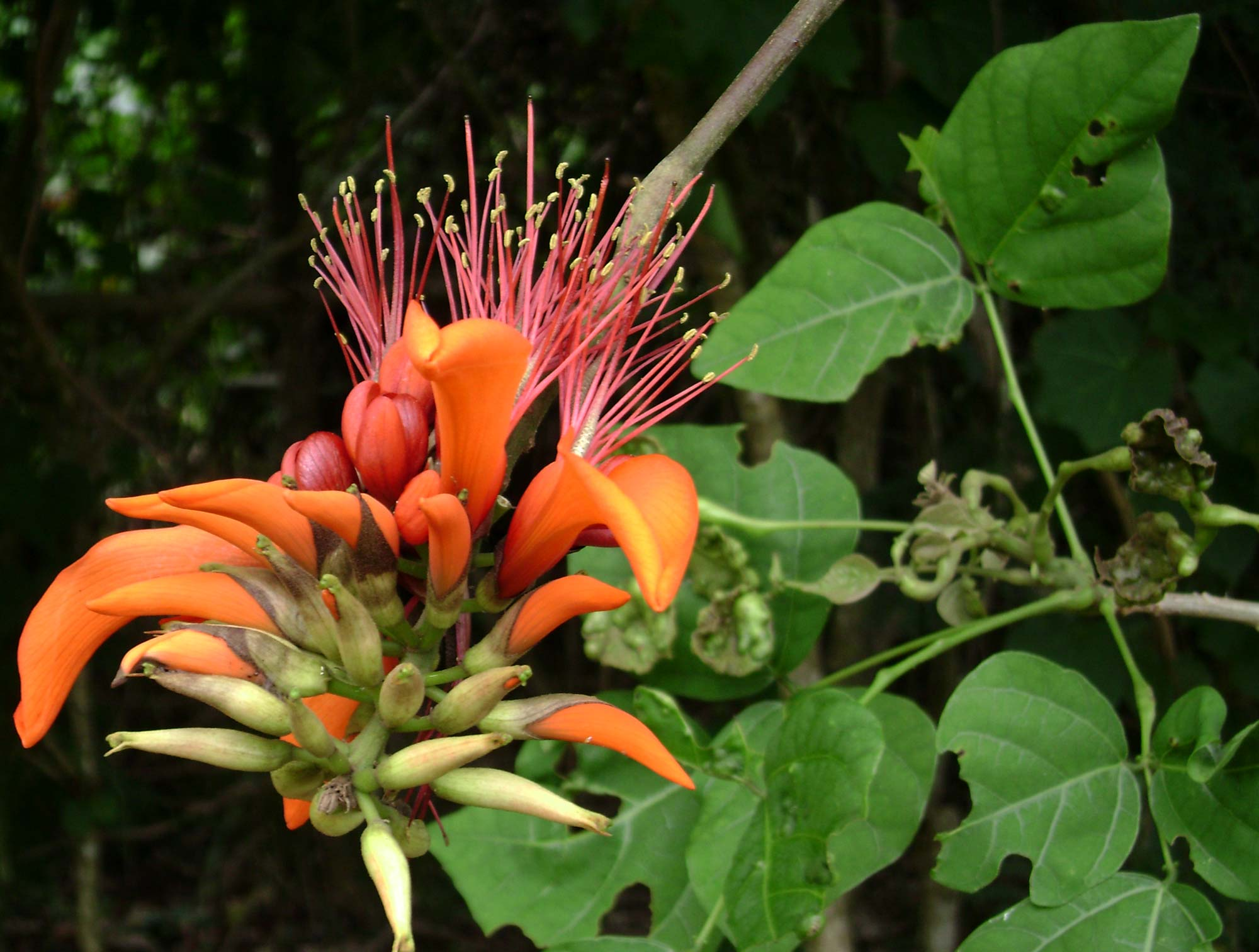 Erythrina variegata, (ngatae) in Vavaʻu, Tonga